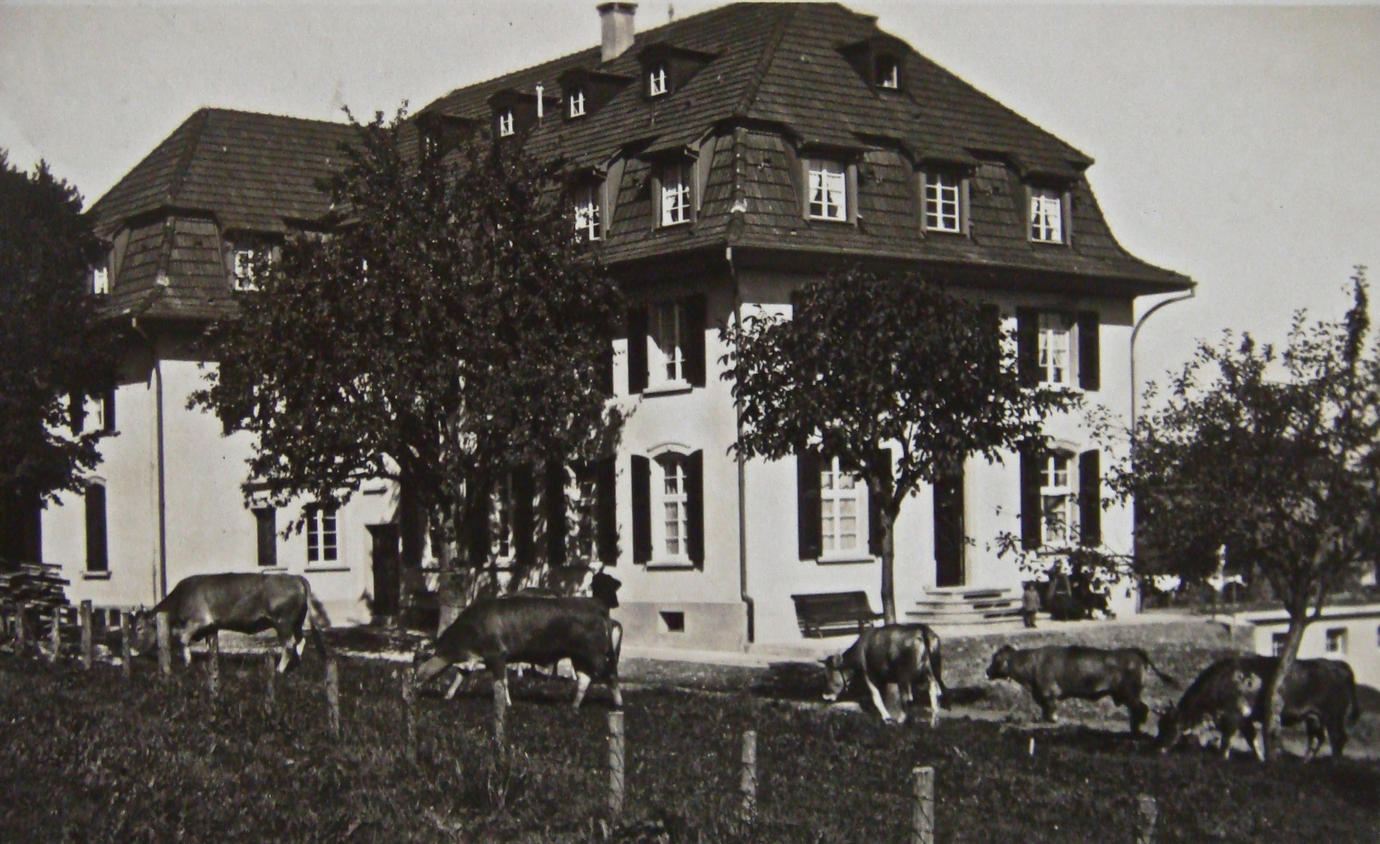 Solbäder in Mumpf - Solbad und Gasthof Schönegg nach dem Wiederaufbau 1928